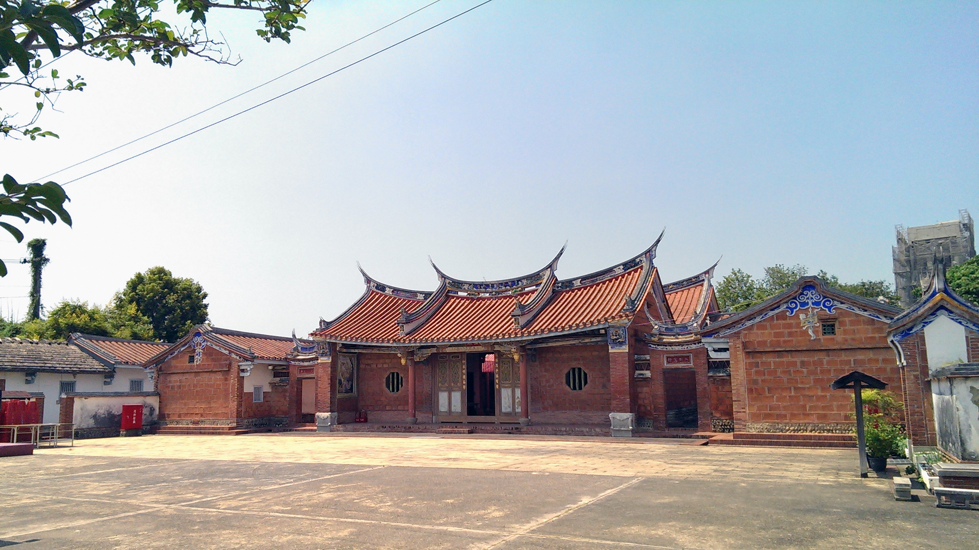 中文（台灣）: 張家祖廟全景